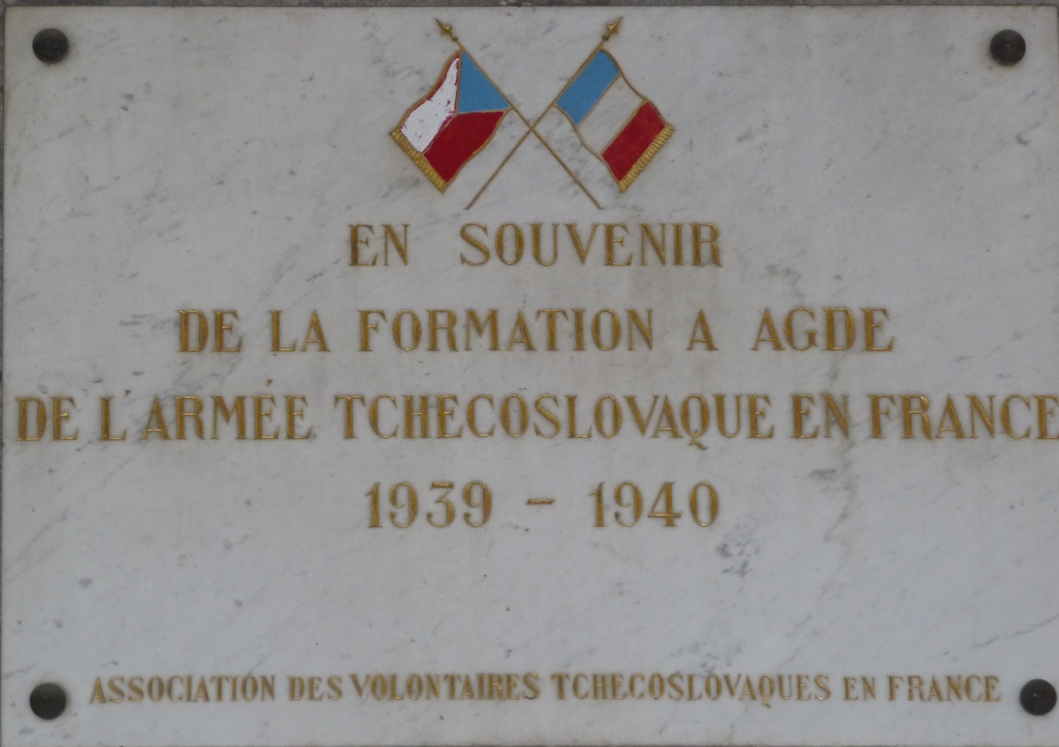 Plaque commémorative de la formation de l'armée tchécoslovaque à Agde 1939-1940 (Hérault, France)